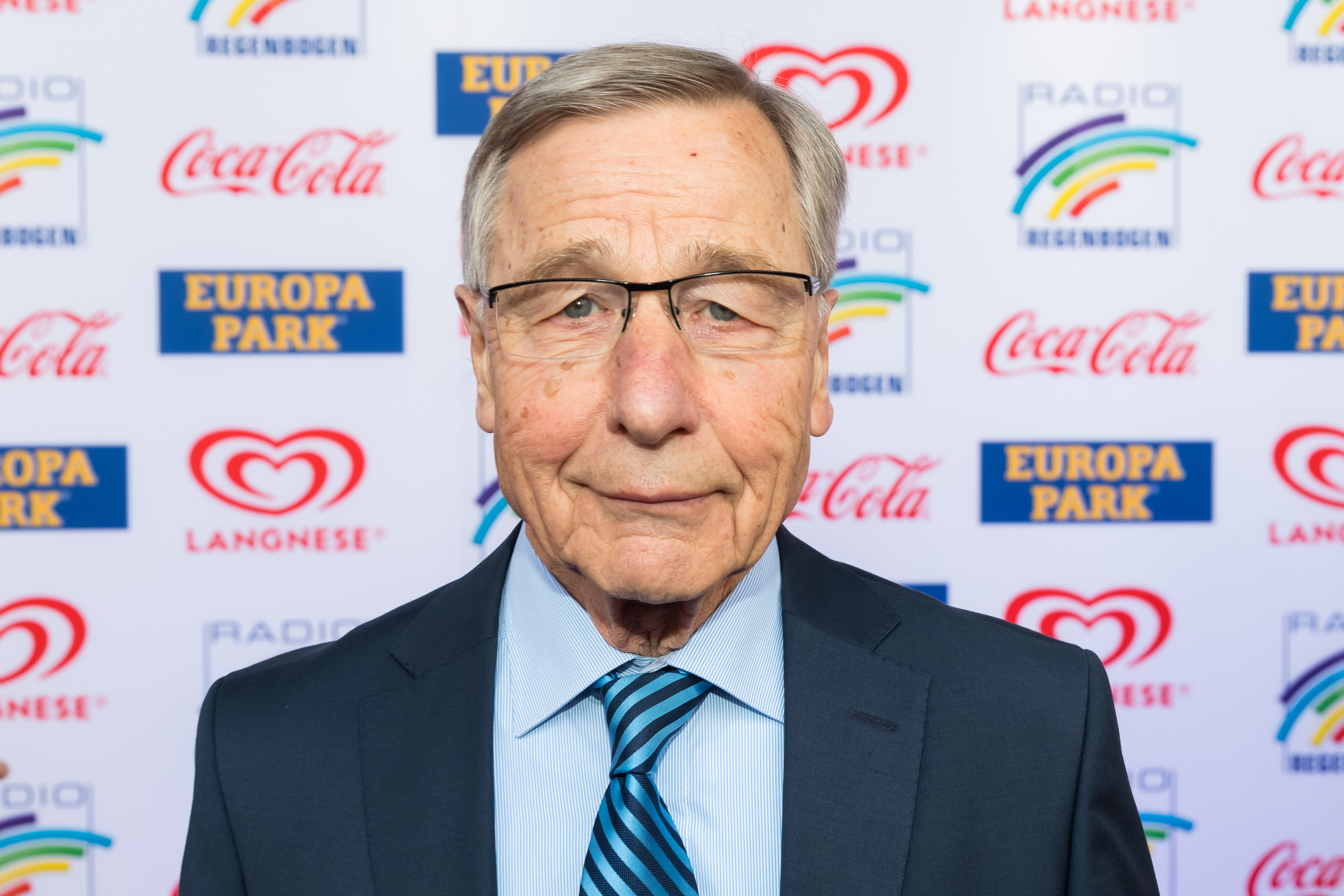 Wolfgang Clement during Radio Regenbogen Award 2019 at Europapark, Rust, Baden-Württemberg, Germany on 2019-04-12, Photo: Sven Mandel